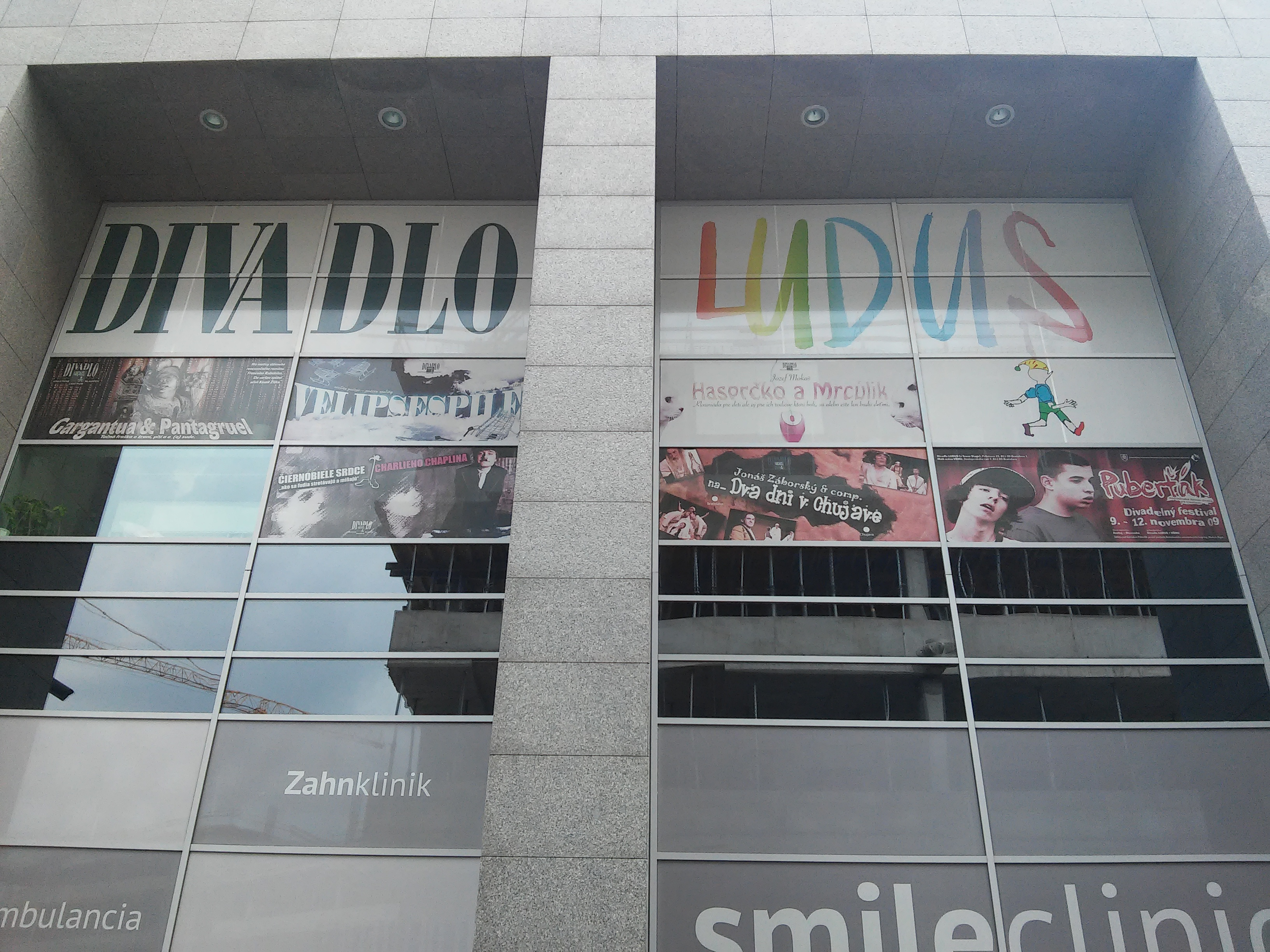 Divadlo Ludus, Staré Mesto, Bratislava